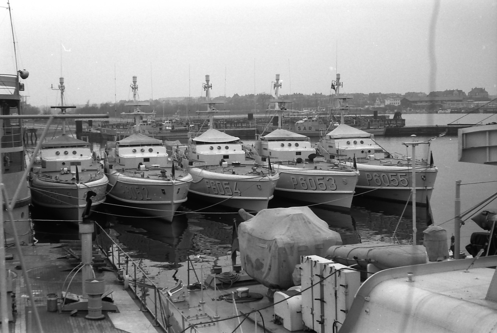 1.S-Geschw.